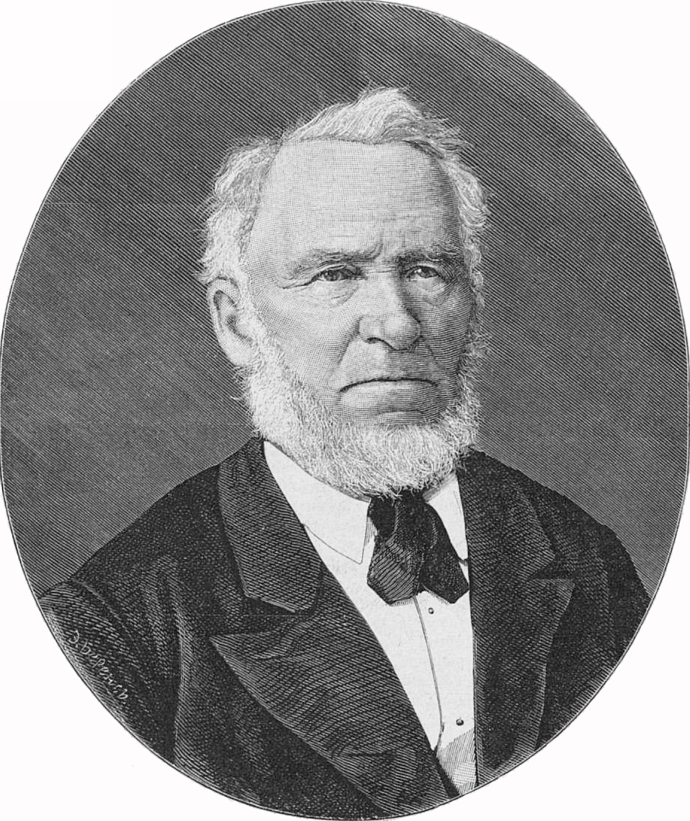 Регель Эдуард Людвигович, ботаник